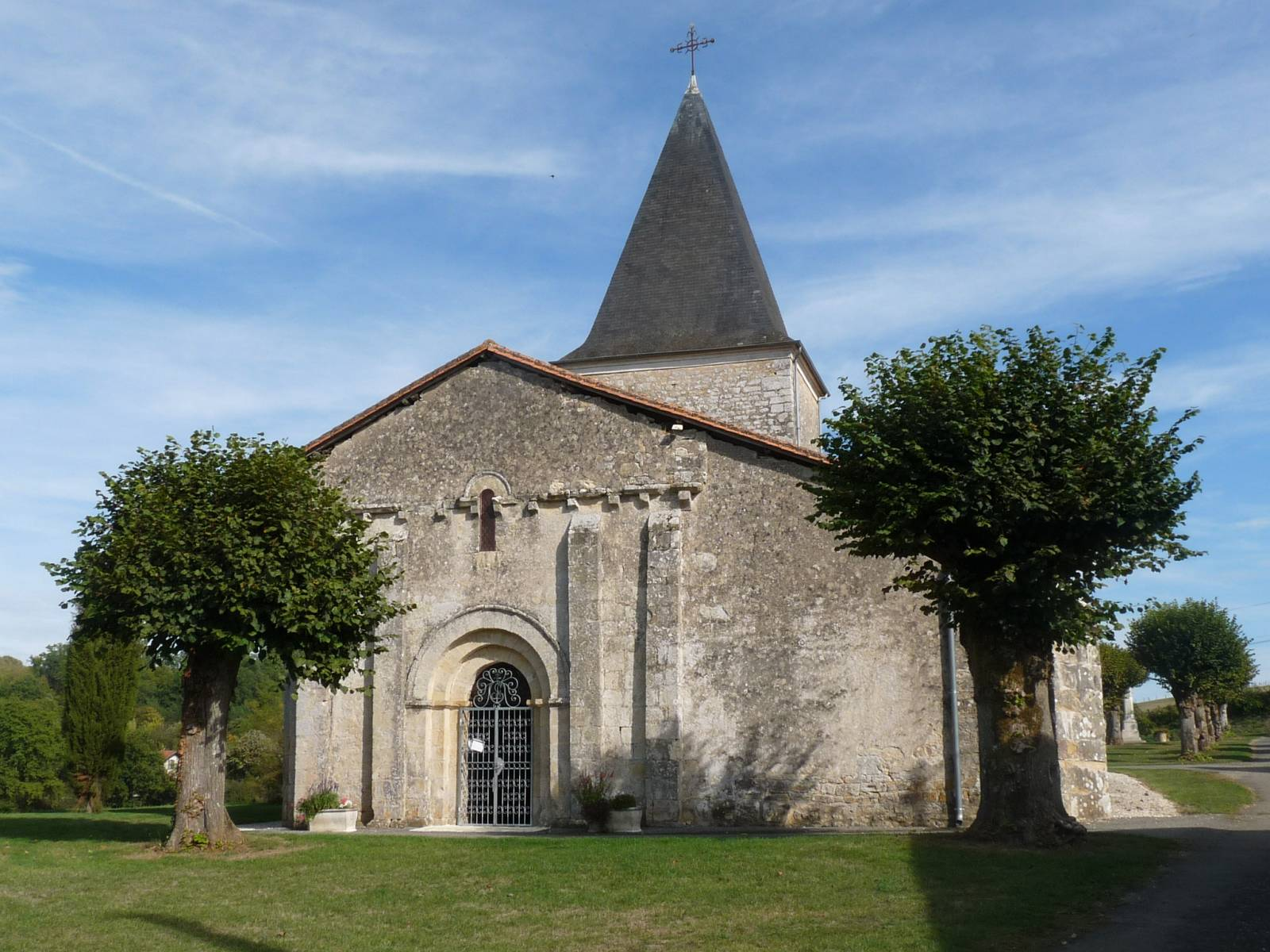 église de St-Gervais, Charente, France